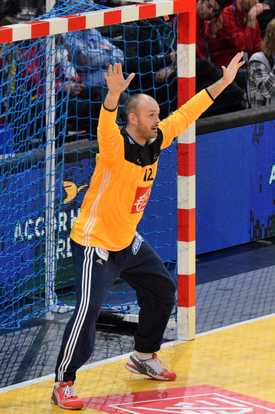 Le 10 janvier 2016 lors du match France / Danemark durant la Golden League à l'AccorHotels Arena (Paris).